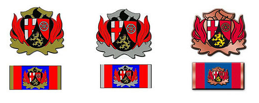 Auszeichnung Feuerwehr / Präsident des LFV RLP